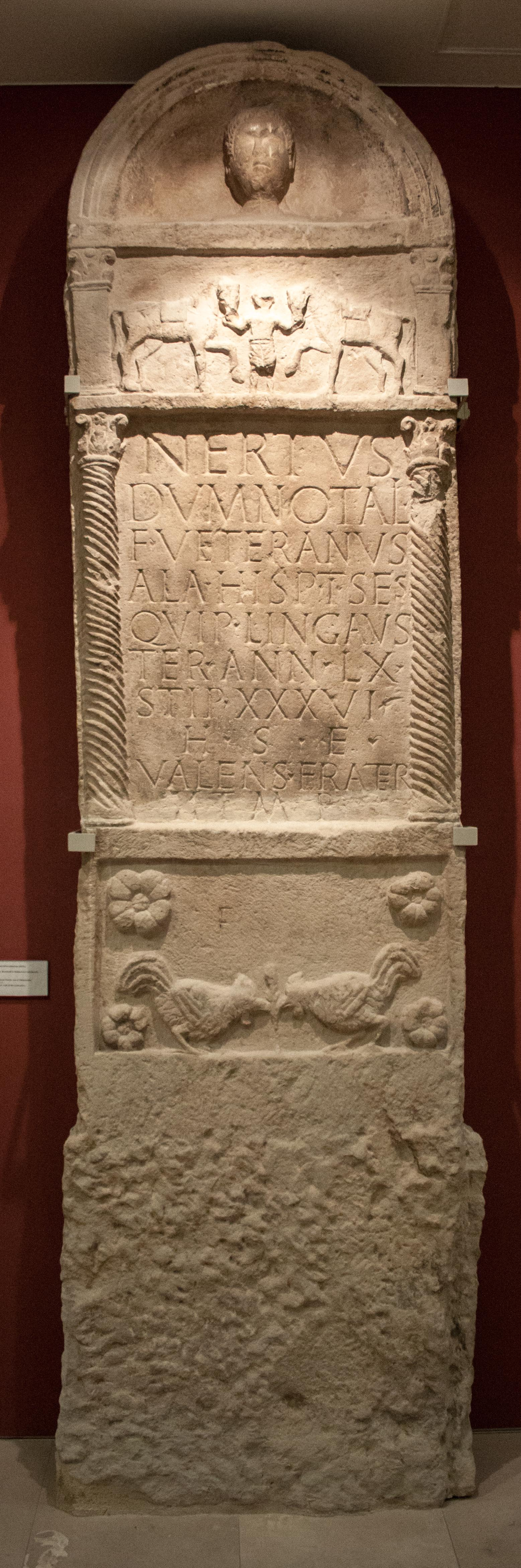 Stèle funéraire de Nertus, fils de Dumnotalis au Musée national hongrois à Budapest, portant l'inscription transcrite par CIL III, 10514 = RHP 00126 = Schober 00271 = TitAq-02, 00676 = AE 2003, +00019 : Nertus / Dumnotali / f(ilius) veteranus / ala Hisp(anorum) I ses/quip(licarius) Lingaus/ter ann(orum) LX / stip(endiorum) XXXVI / h(ic) s(itus) e(st) / Valens frater / h(eres) t(itulum) m(emoriae) p(osuit) // F